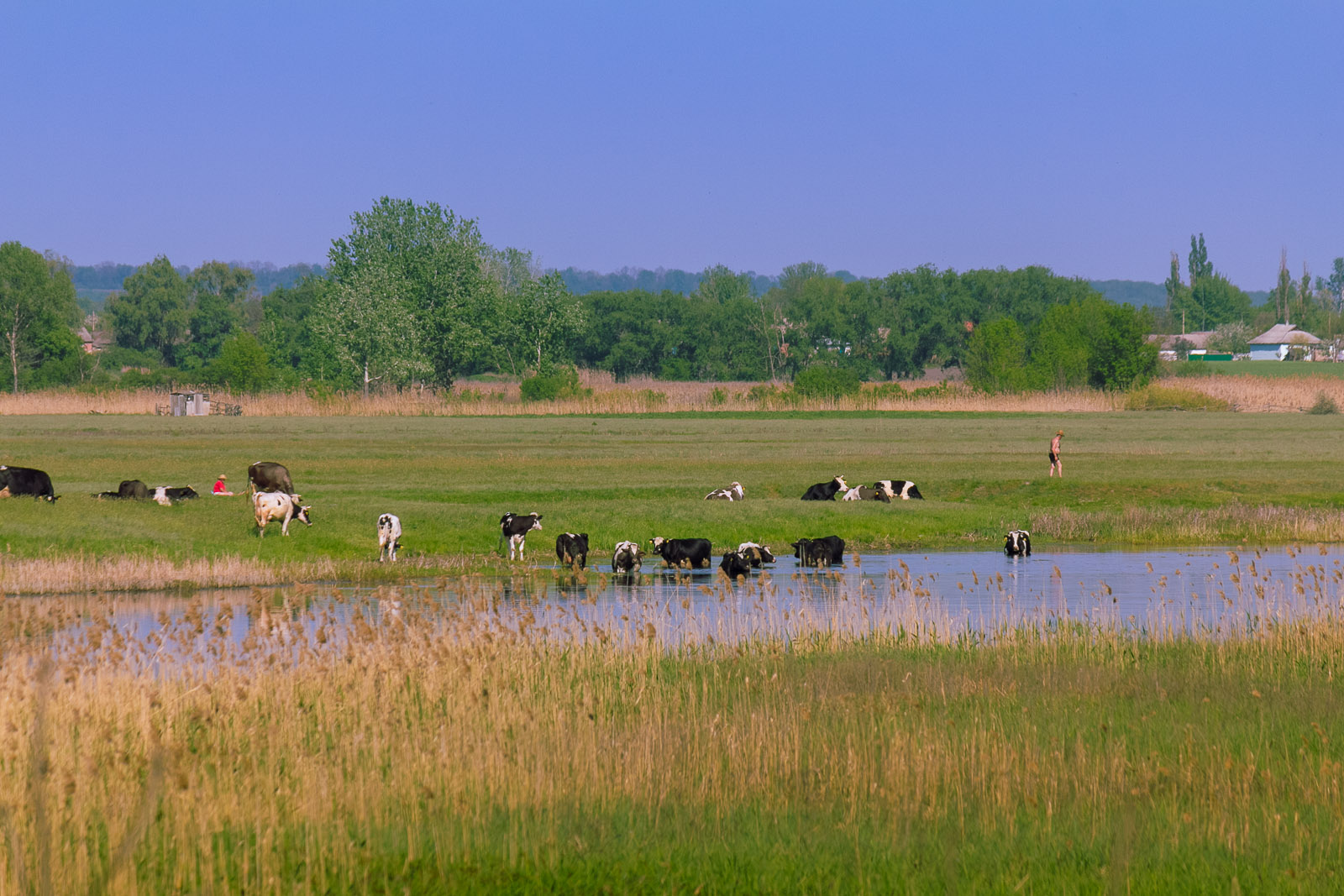 Приорільський